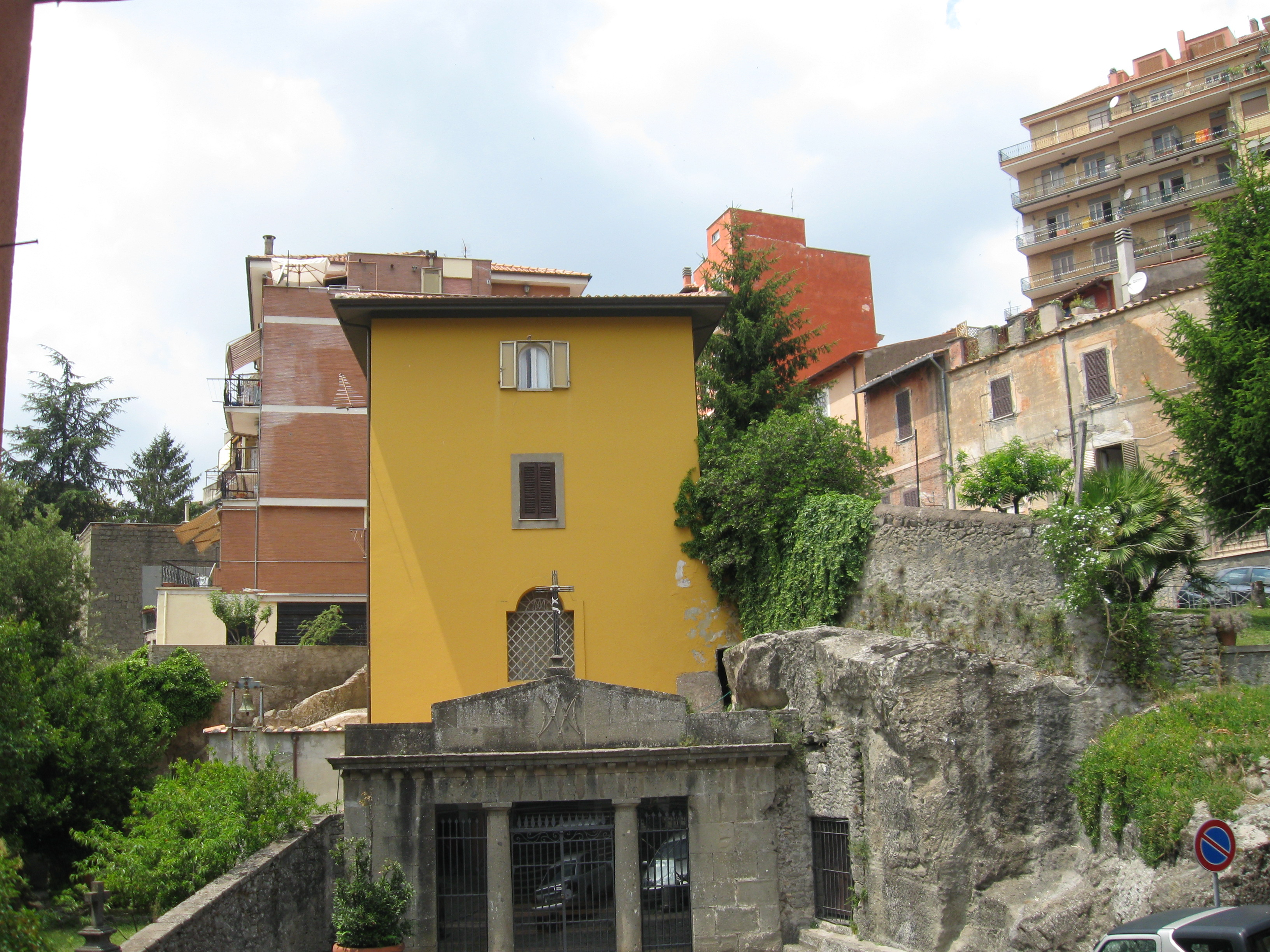 Il santuario dell'Acquasanta di Marino (RM) - 01